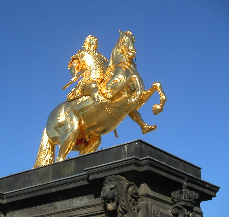 „Goldener Reiter“ – Reiterdenkmal von August dem Starken in Dresden-Neustadt